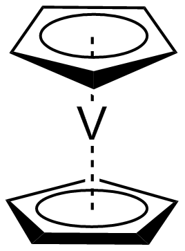 Vanadoceen